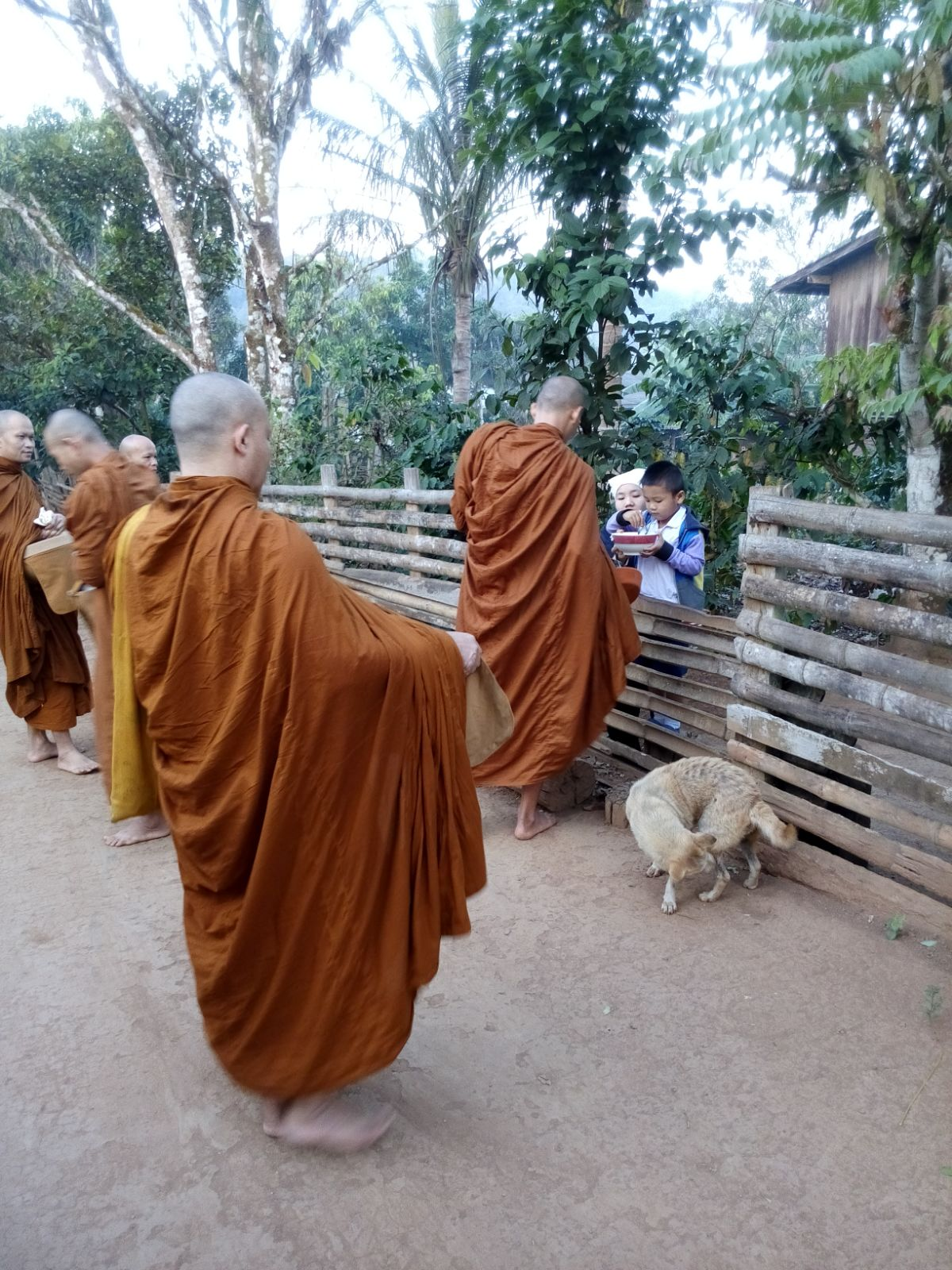 泰国山中托钵